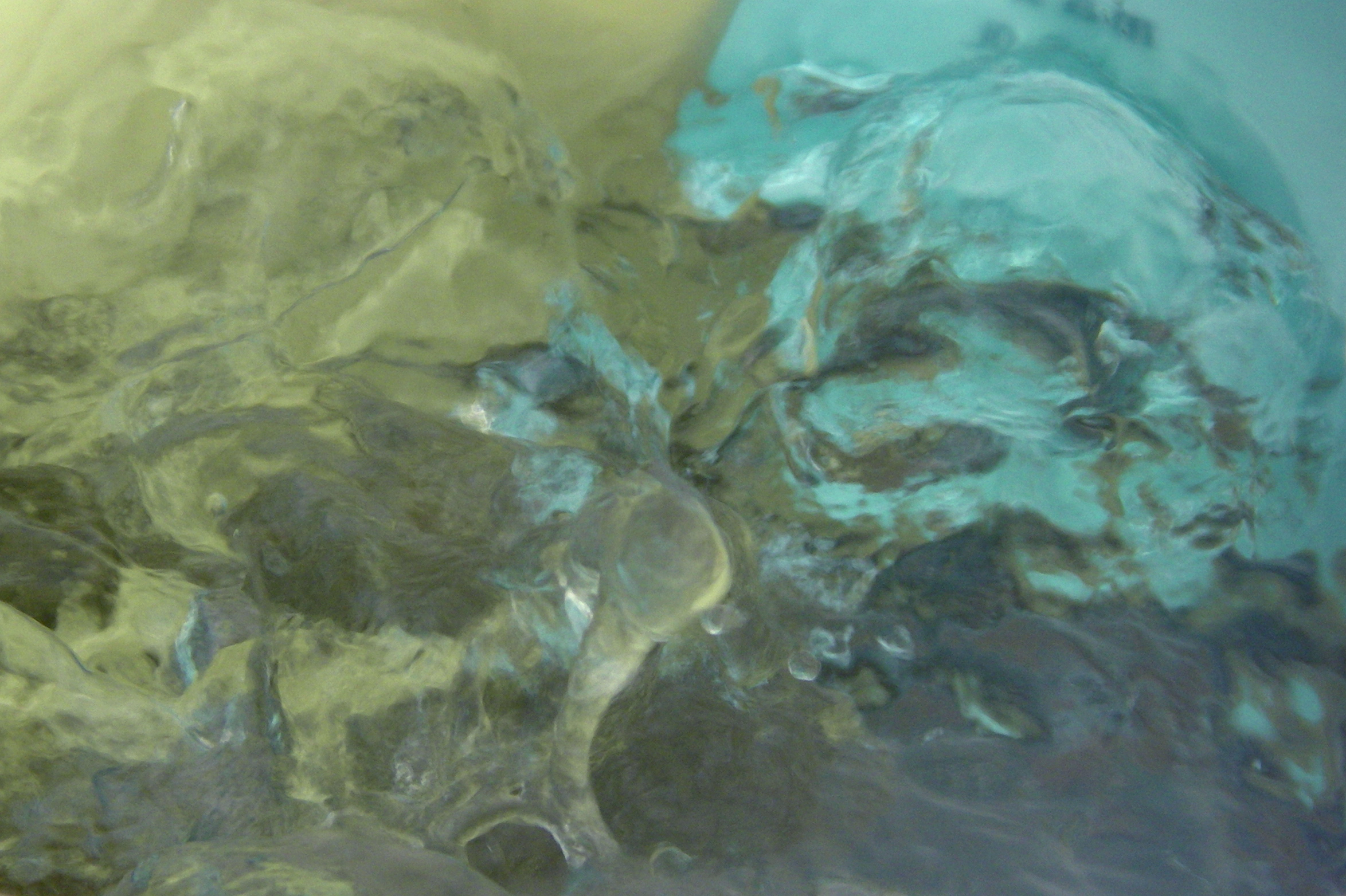 Кипящая вода (кипяток)